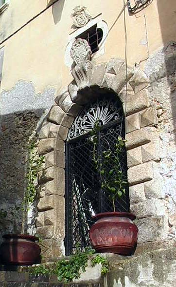 Front of Palazzo Lupis-de Luna d'Aragona-Sanseverino in Grotteria (RC), Italy